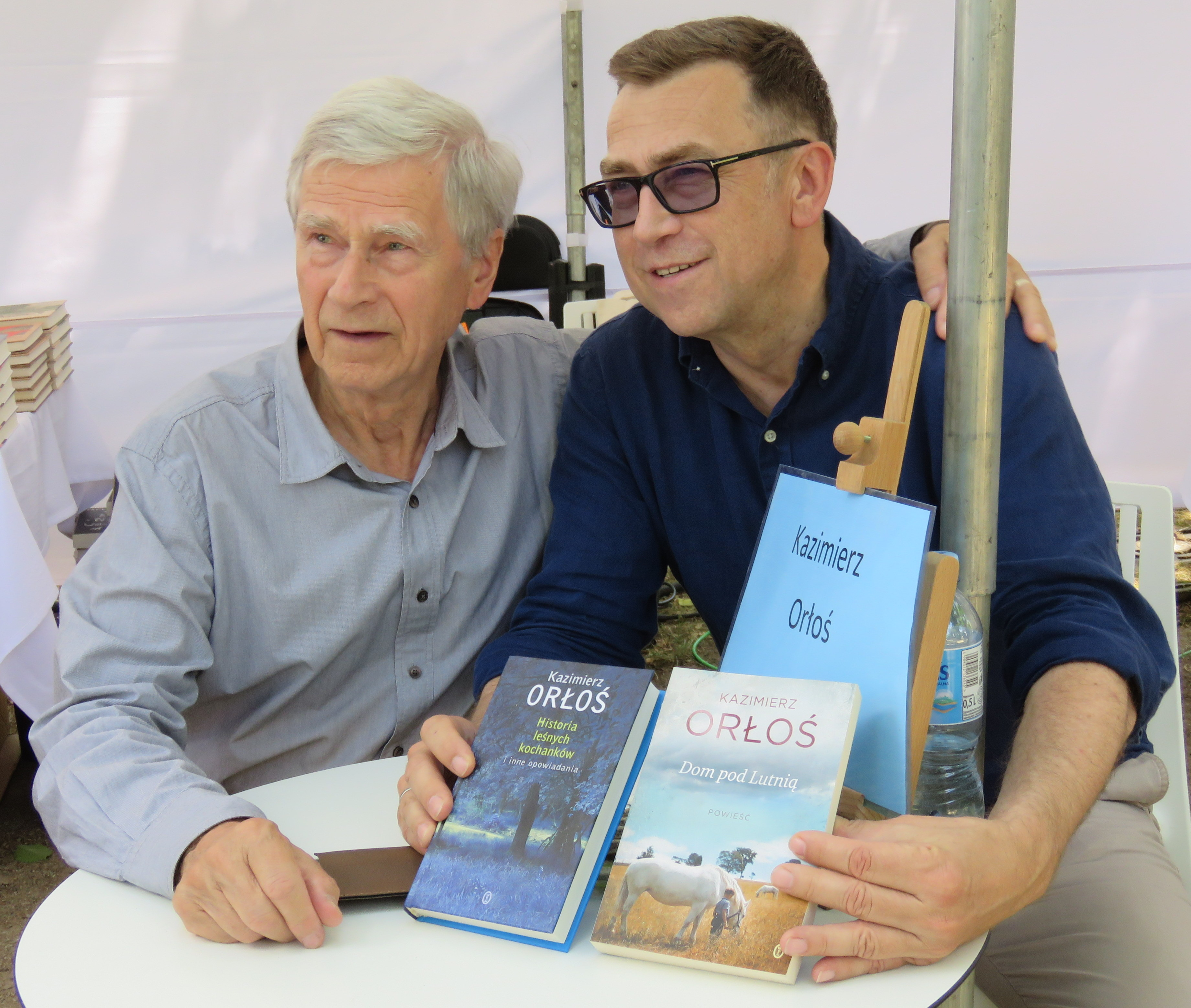 Kazimierz Orłoś (b. December 26, 1935 in Warsaw, Poland) - Polish writer with his son, Maciej Orłoś (b. 1960), Polish journalist.